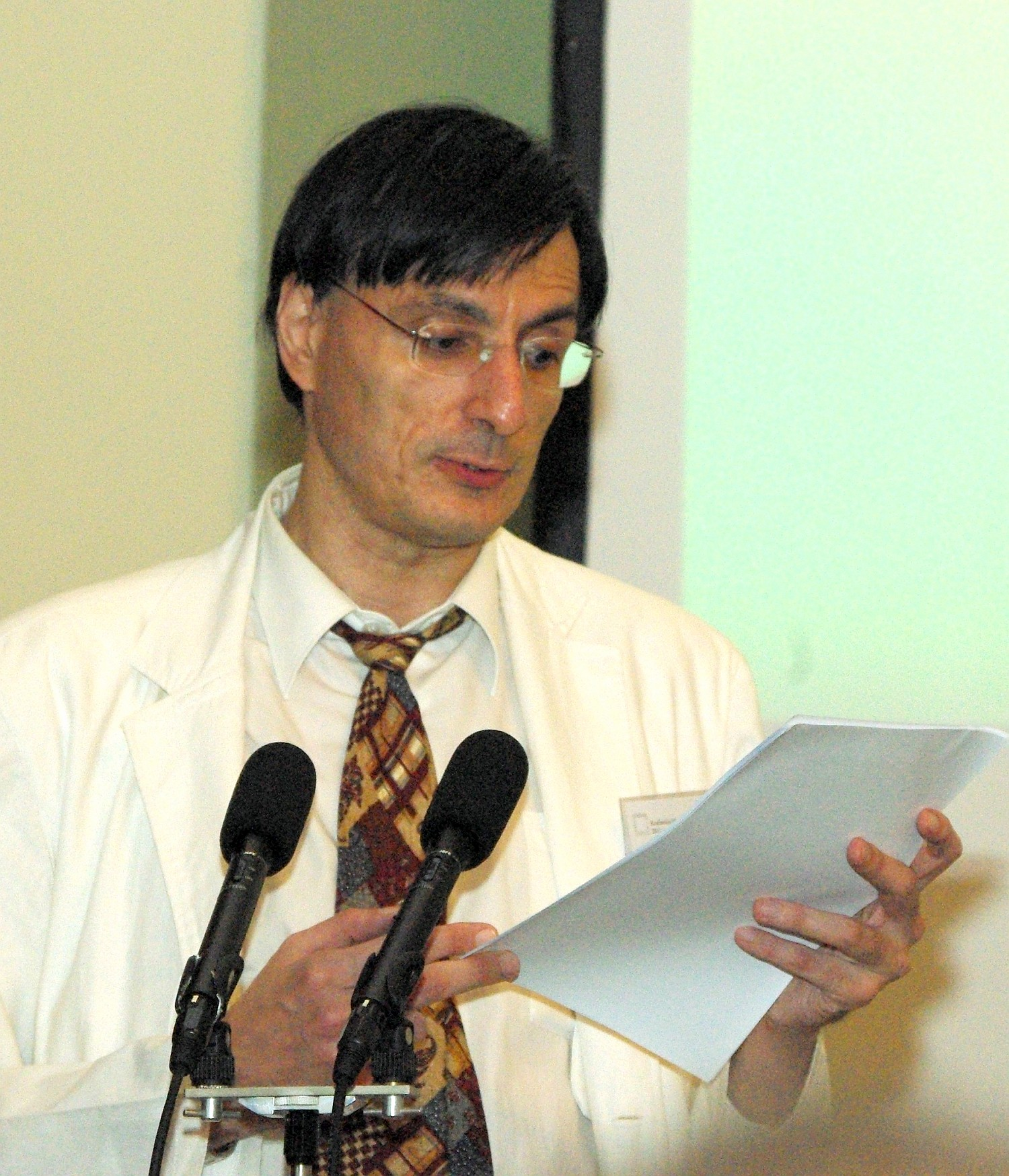 Kecskeméti Gábor (1965–) irodalomtörténész, a Filológia és textológia a régi magyar irodalomban elnevezésű nemzetközi konferencián